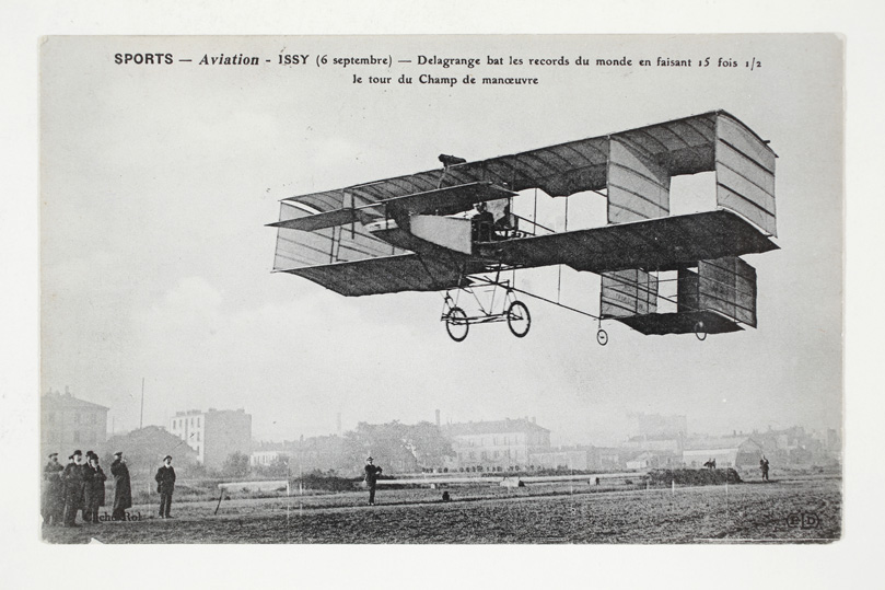 Sports — Aviation – Issy (6 septembre) — Delagrange bat les records du monde en faisant 15 fois 1/2 le tour du Champ de manoeuvreAdresse actuelle : Héliport